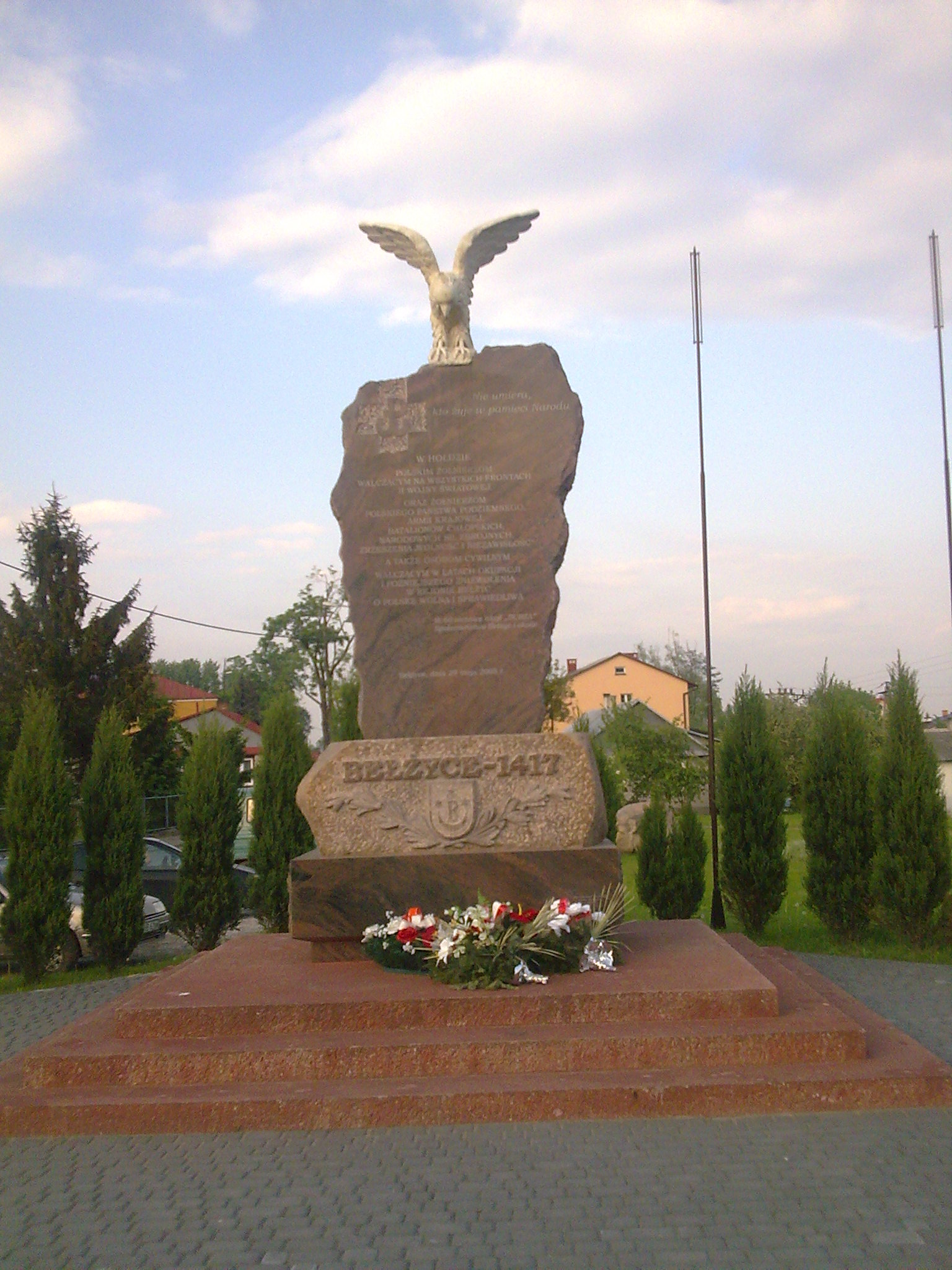 Pomnik Polski Walczącej w Bełżycach